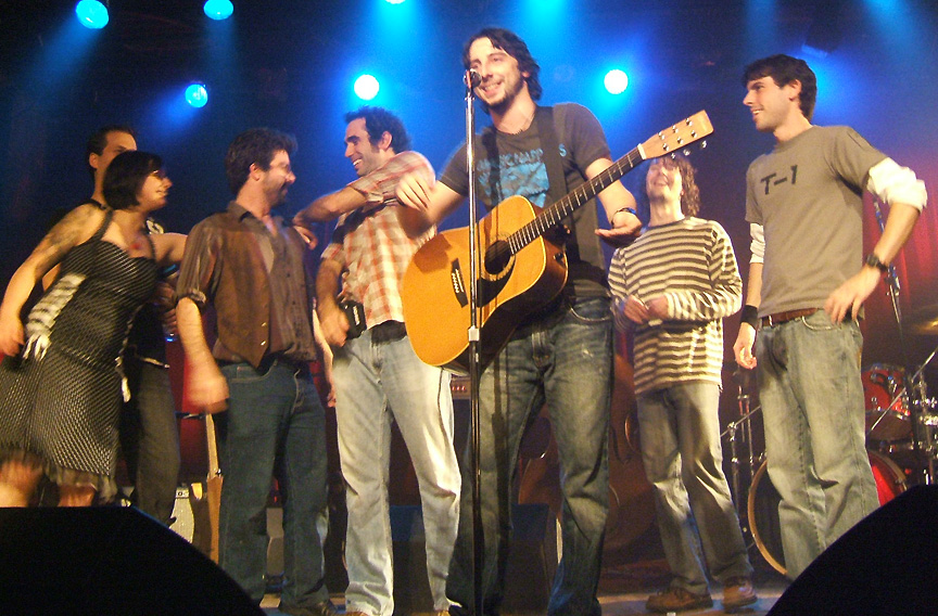 Le groupe Marco et les Torvis sur scène lors de leur lancement au Lion d'Or à Montréal.